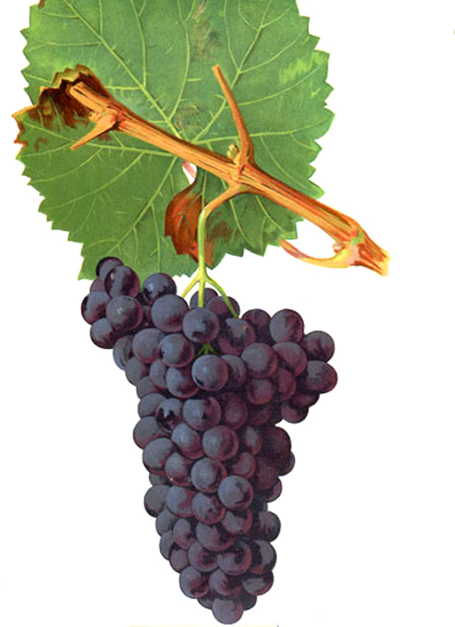 Grappe de Siramuse par Viala et Vermorel